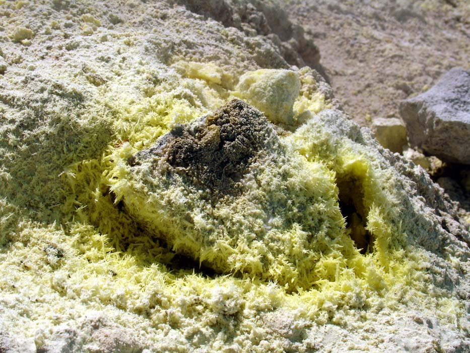 Небольшой фумарол на вершине вулкана Авачинская сопкаНа фотографии видны кристаллы самородной серы, выросшие по краям фумарола